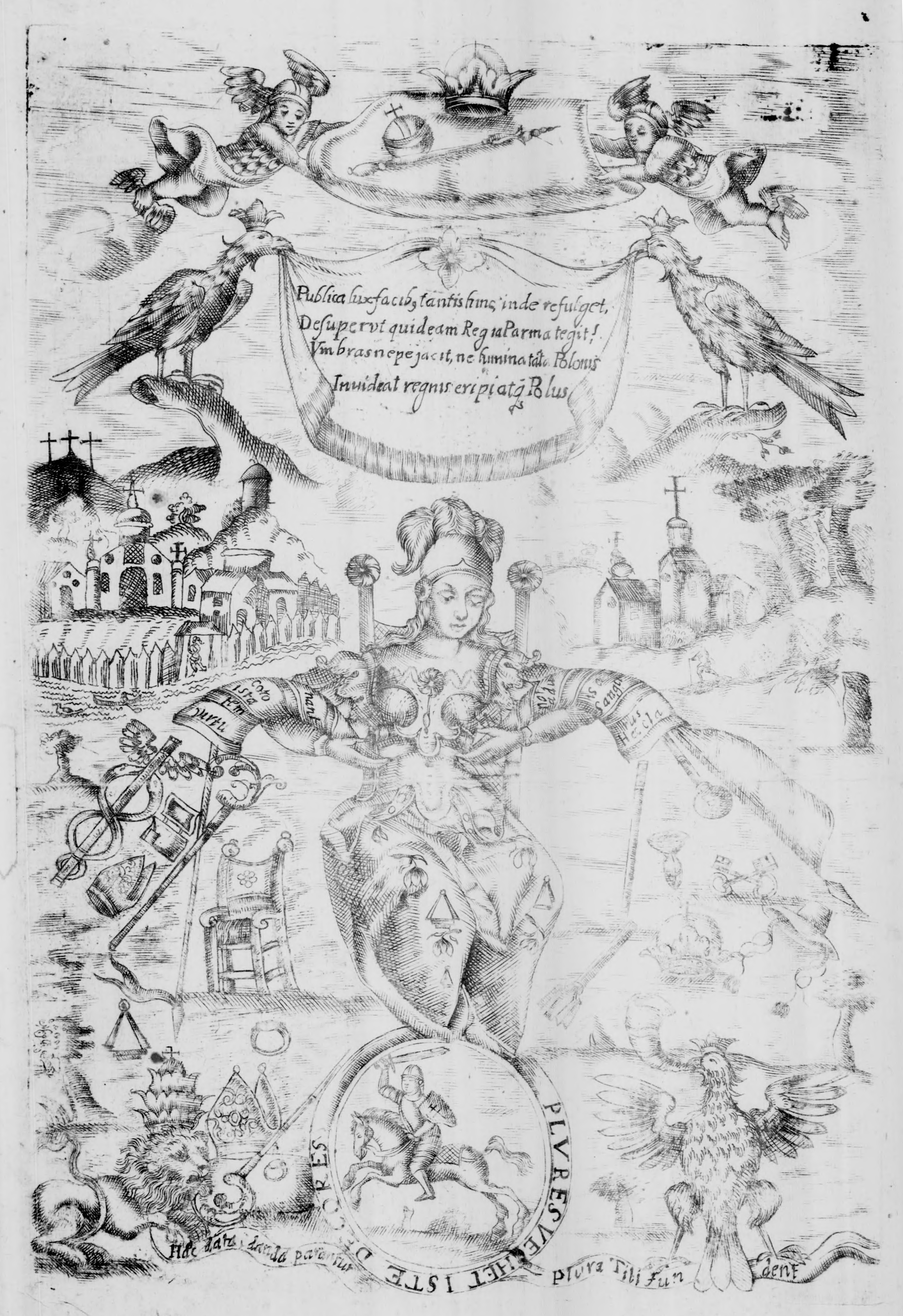 Беларуская (тарашкевіца): Панэгірык Канстантыну Казімеру Бжастоўскаму (Kanstantyn Kazimier Bžastoŭski) з Пагоняй (Pahonia)